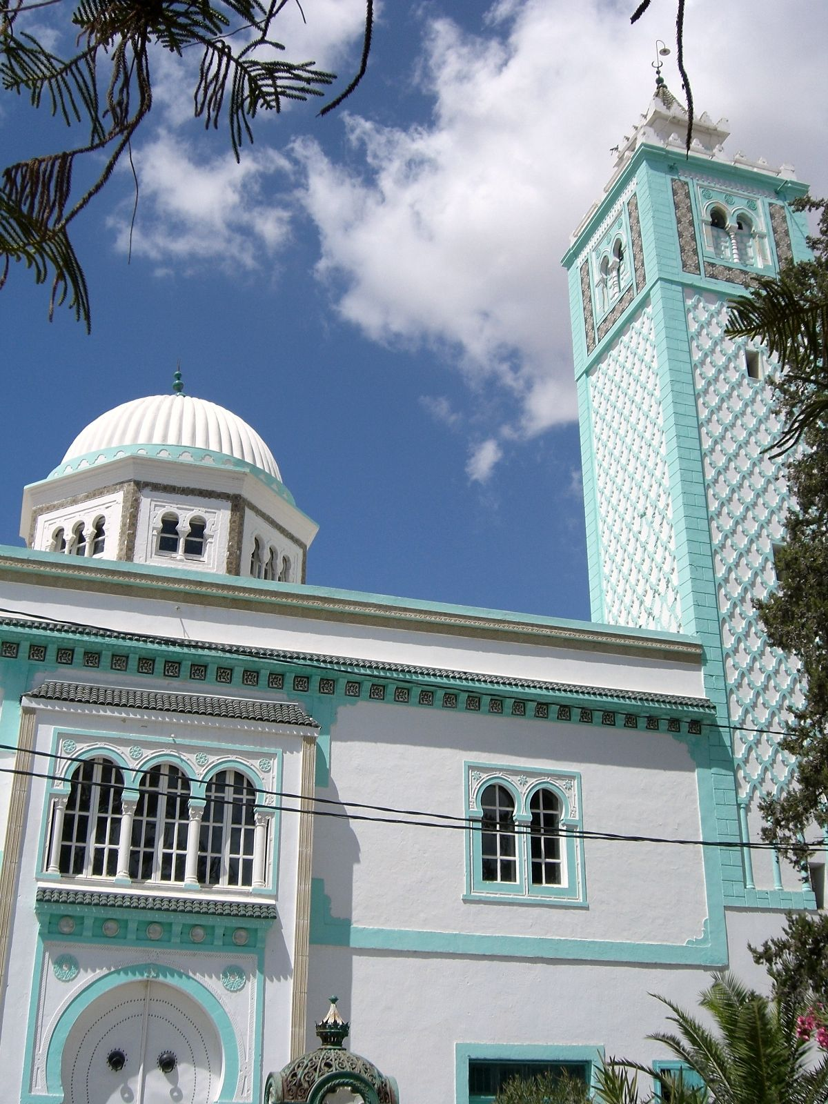 Mosquée Sidi Bouthnia de Mateur Auteur : Dhfaouzi, Faouzi Dhaouadi